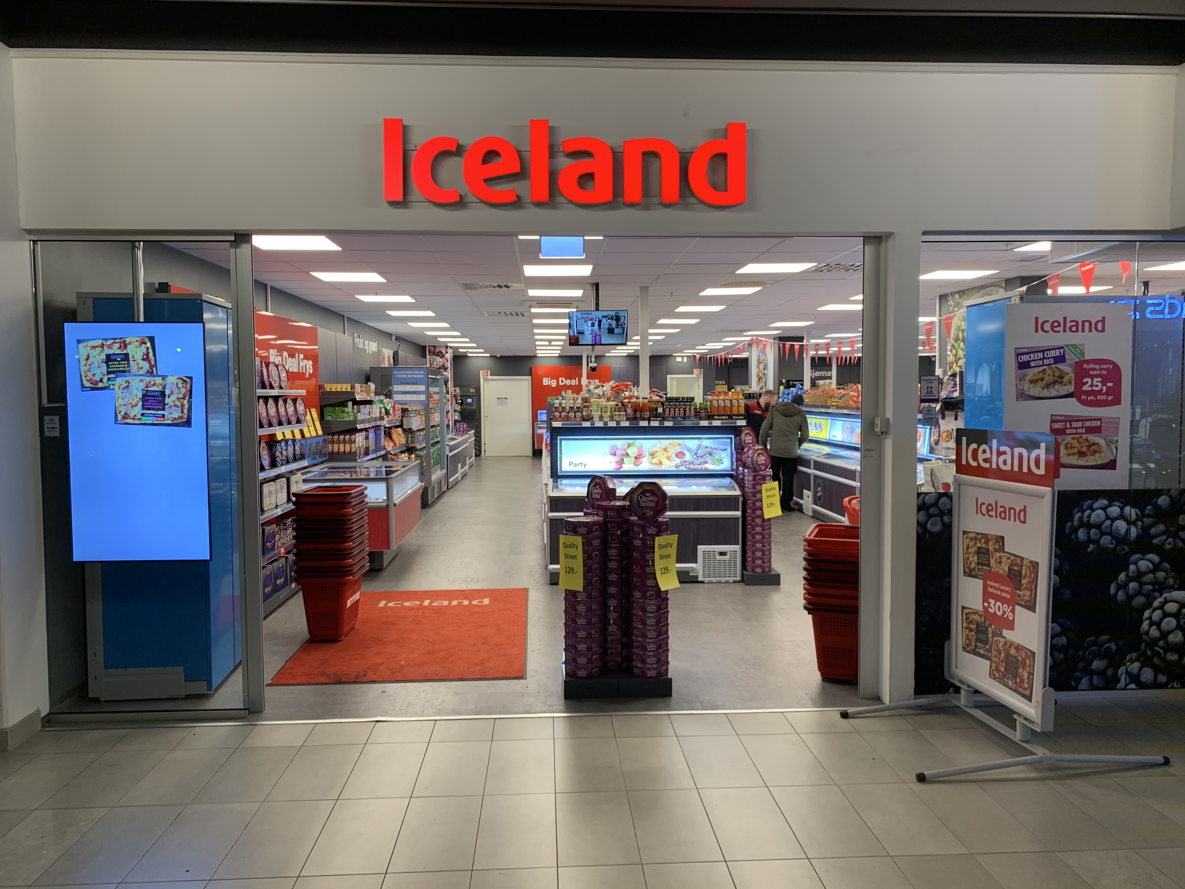 Iceland-butikken på Stovner Senter i Oslo.